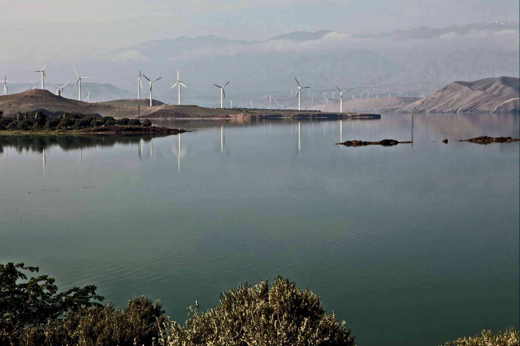 Manjil, Gilan Province, Iran